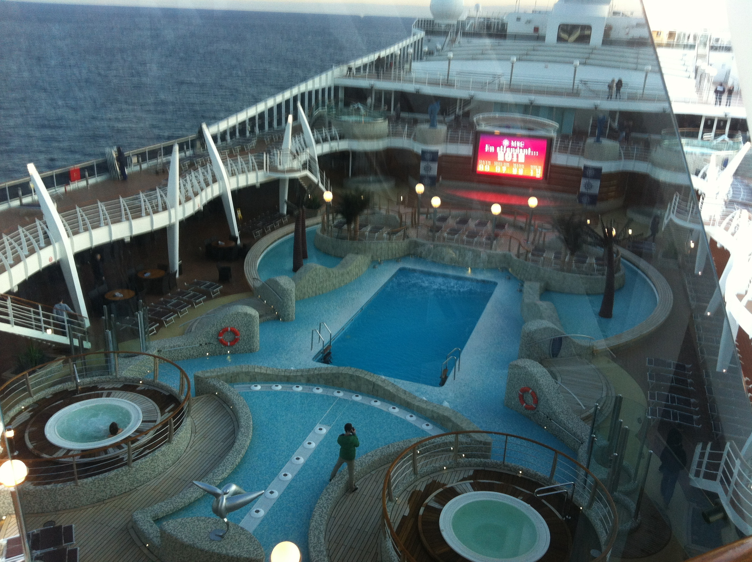 MSC Splendida Ende 2011